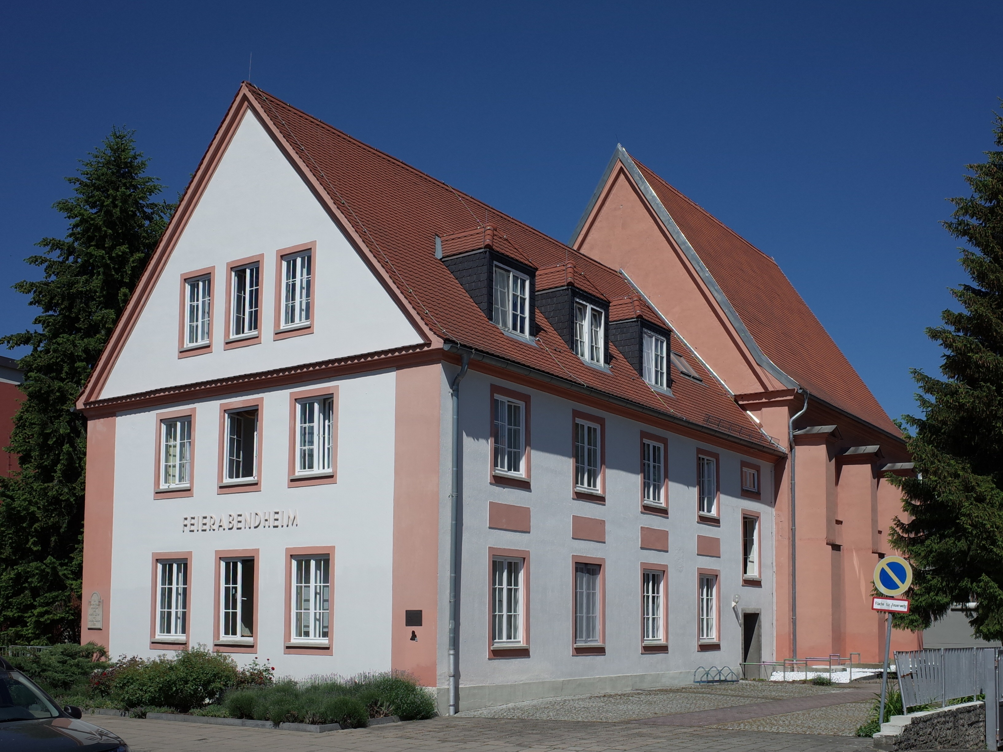 Zerbst/Anhalt, Am Plan 4, ehemaliges Augustinerkloster.